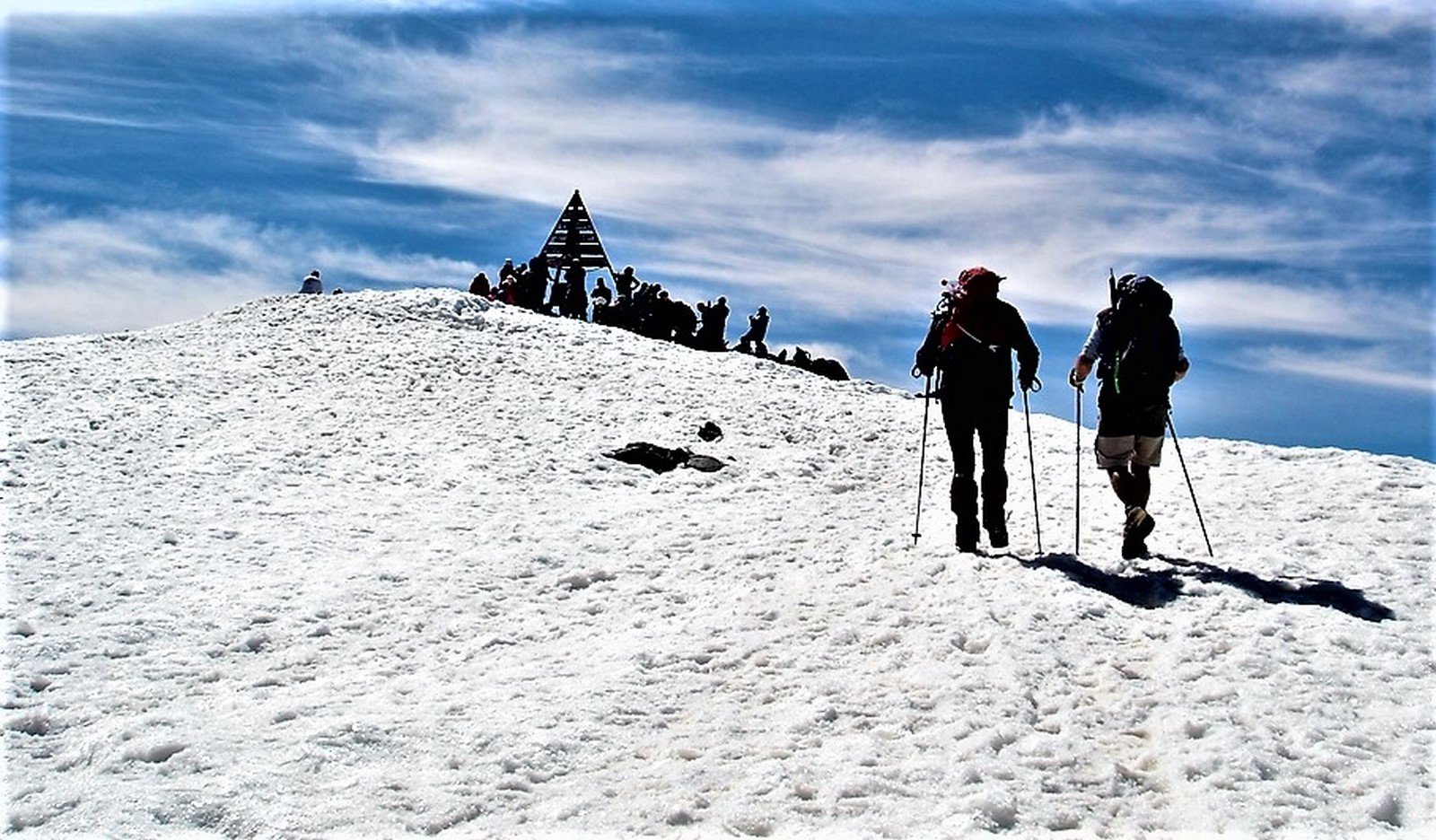 Trekking al Toubkal todo el año